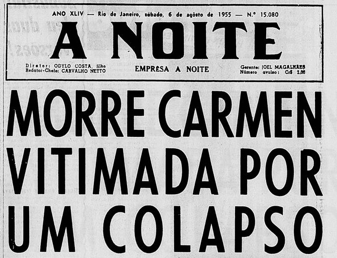 O jornal brasileiro A Noite, noticia a morte da cantora e atriz Carmen Miranda em 6 de Agosto de 1955